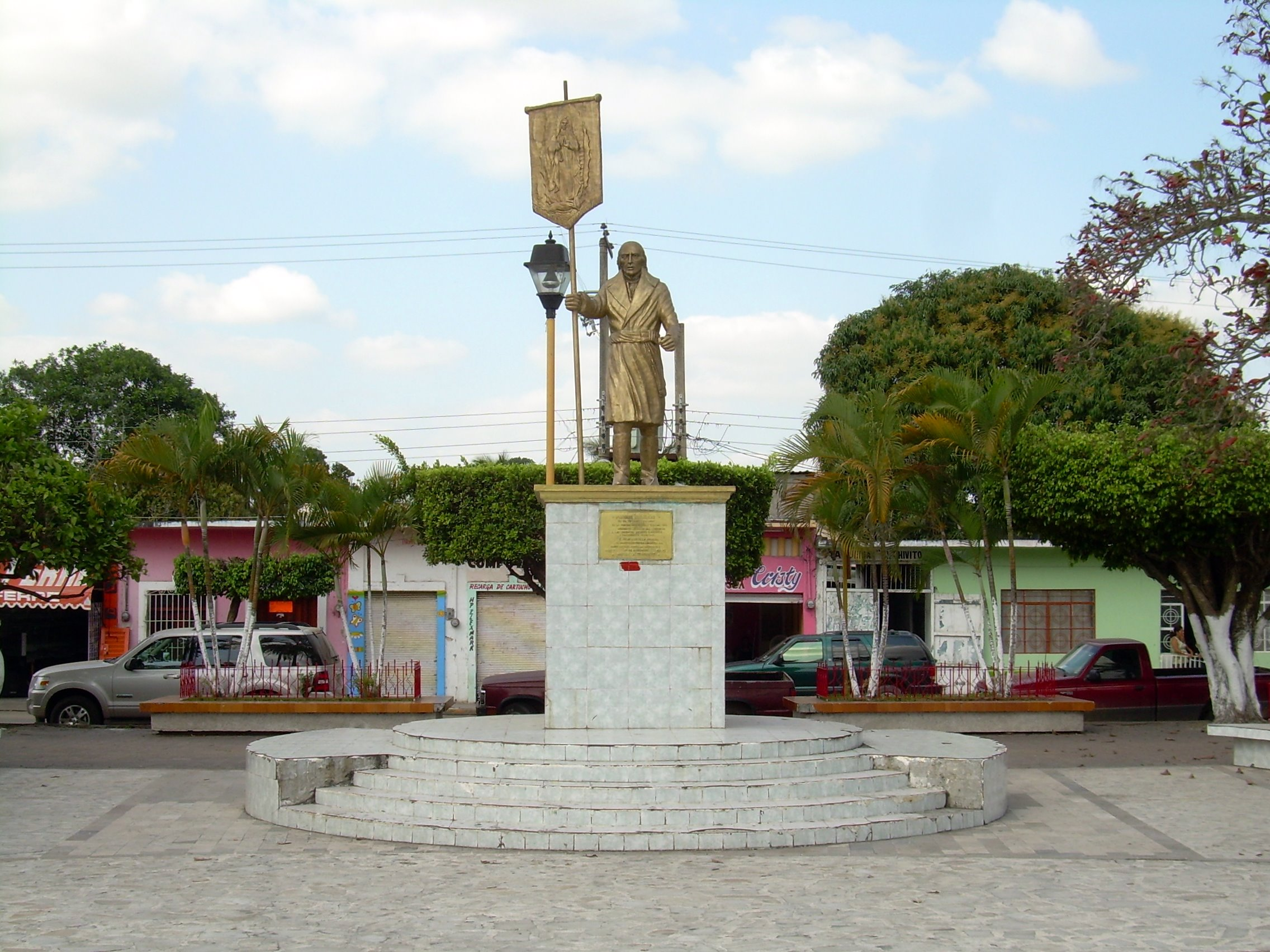 Monumento de Miguel Hidalgo, erigido en 1982 como homenaje a los 75 años de la fundación de Tres Valles